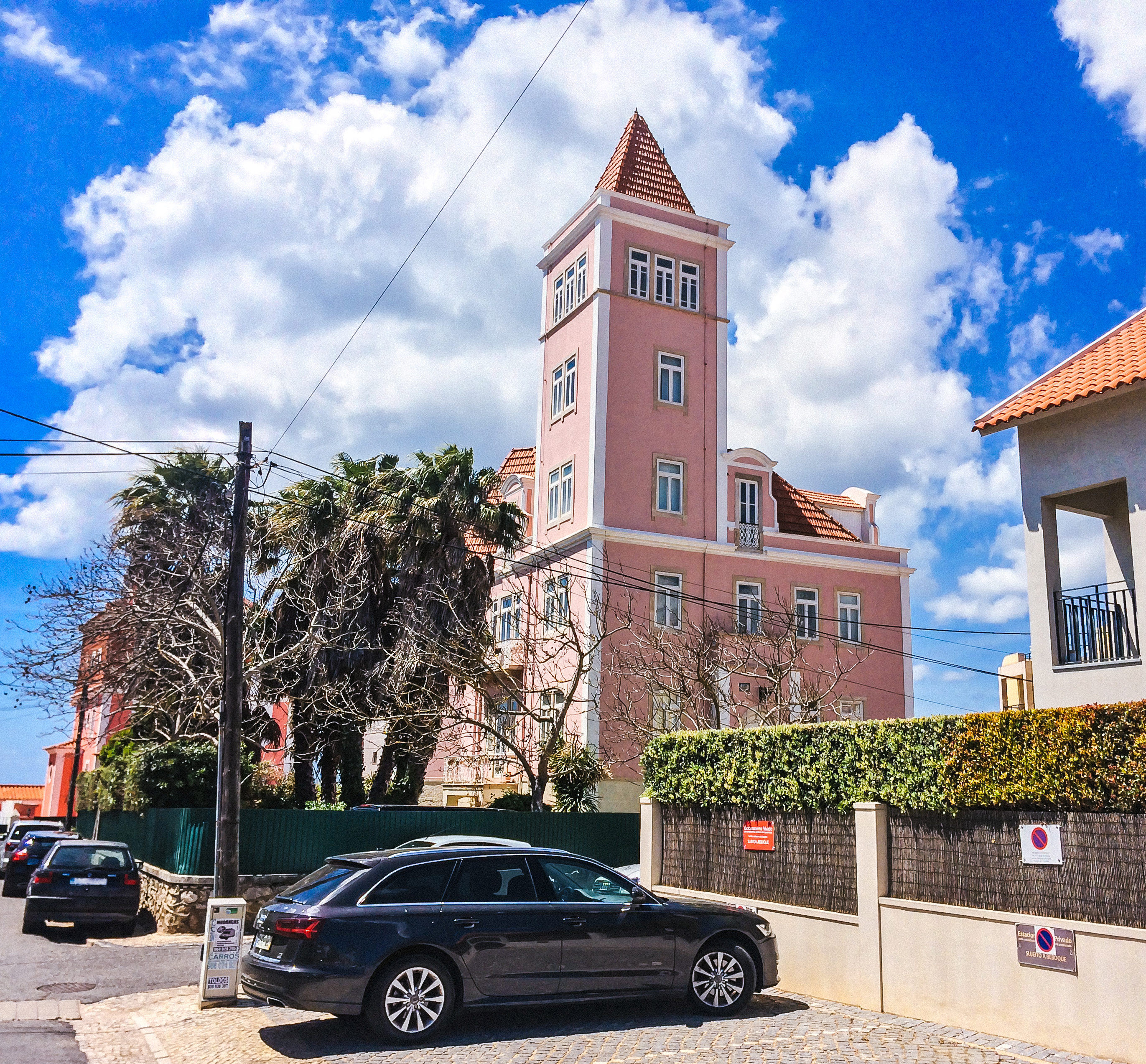 Vista do imóvel